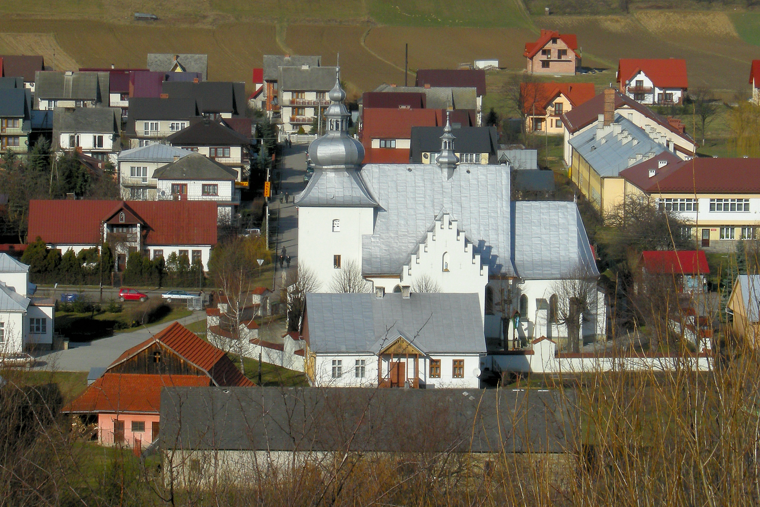 Ujanowice-panorama